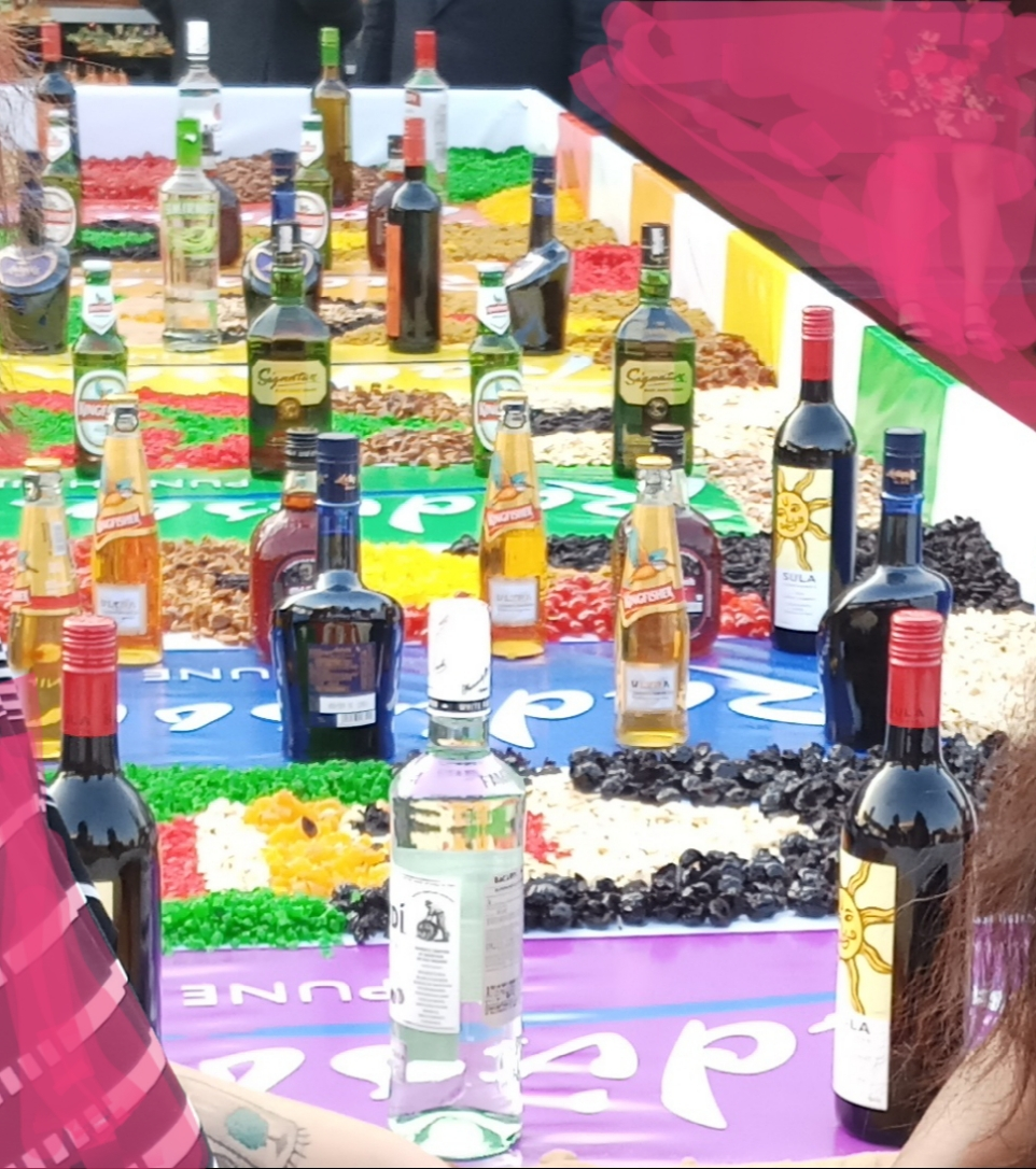 Different Different Drinks in Pune Festival.